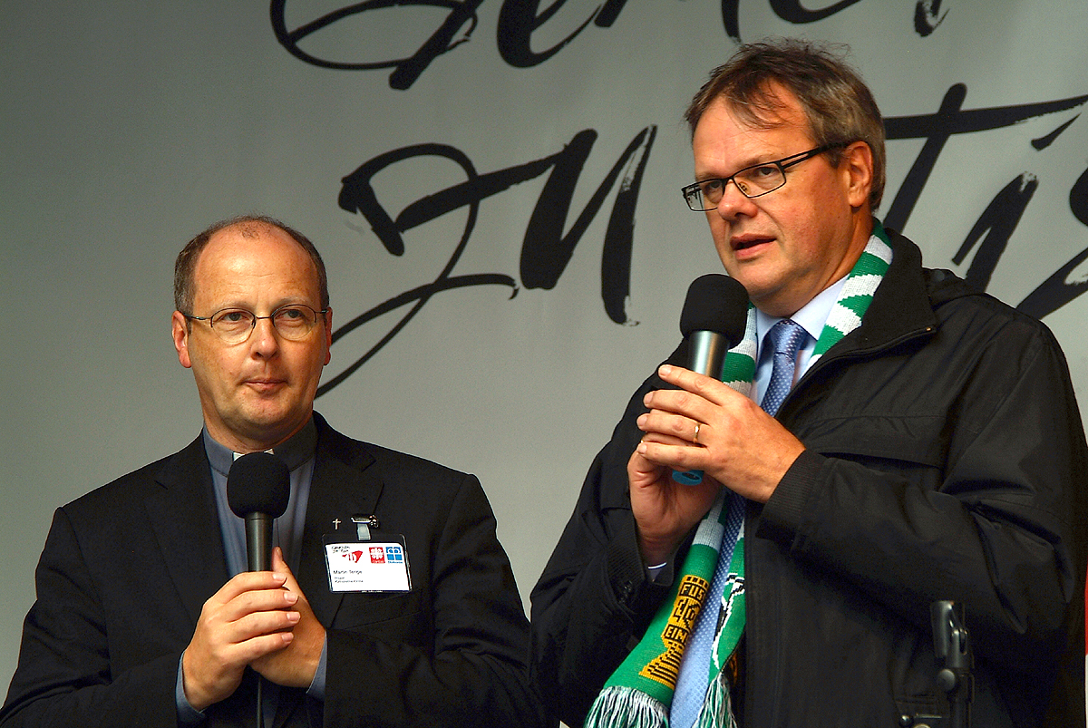 Martin Tenge, Propst an der Basilika St. Clemens in Hannover, Regionaldechant und Domkapitular in Hildesheim, sowie Hans-Martin Heinemann, Stadtsuperintendent des Evangelisch-lutherischen Stadtkirchenverbandes Hannover, auf der Bühne zur Solidaritätstafel 2012 in der Georgstraße ...